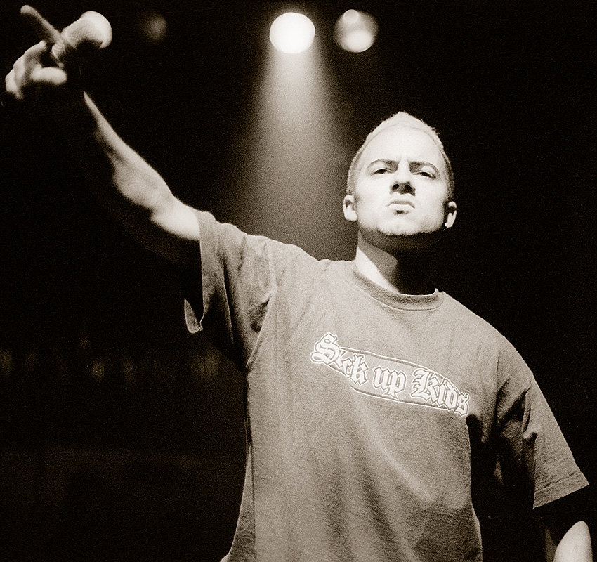 Pure Doze von der Band Too Strong